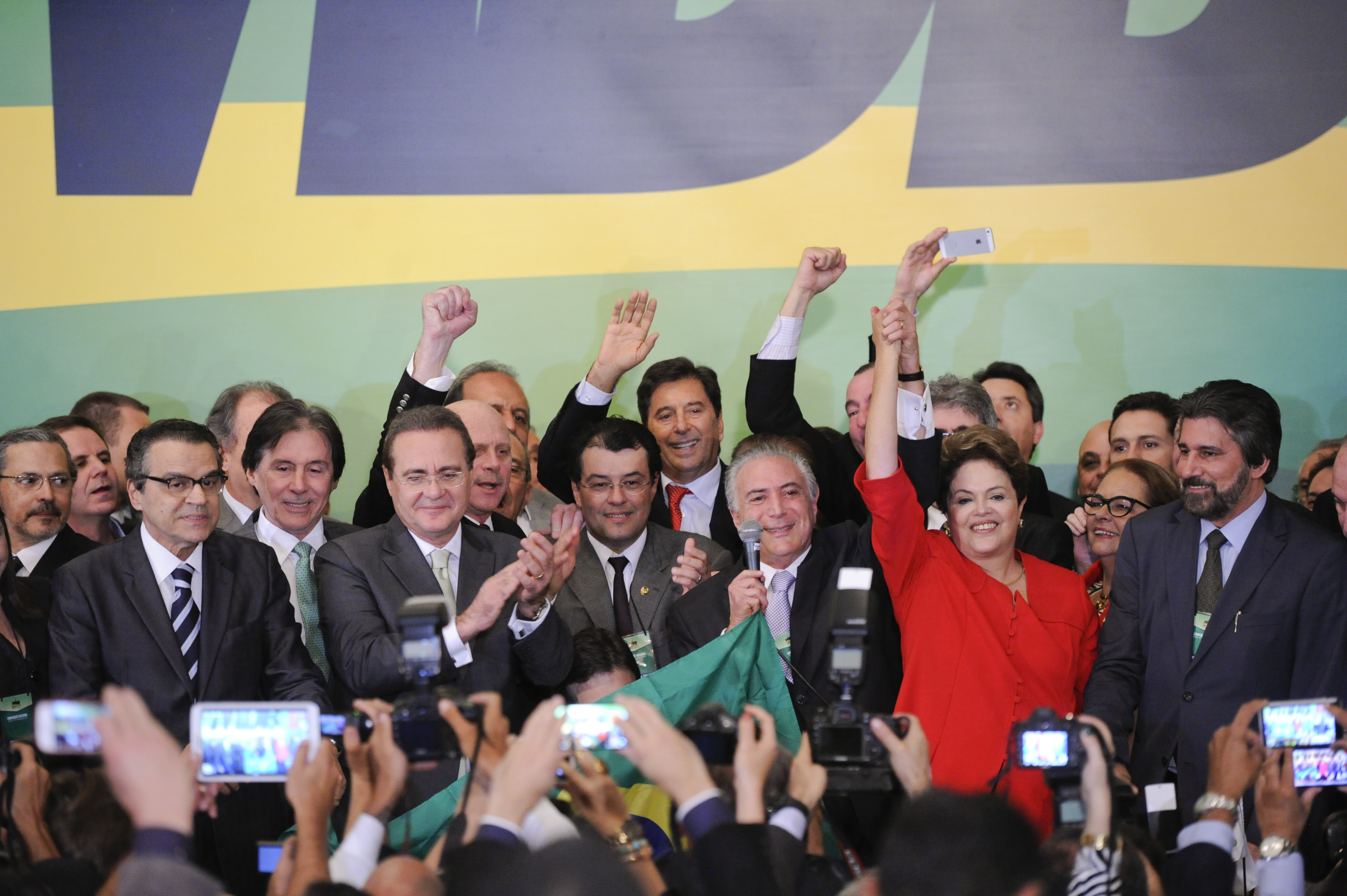 Convenção Nacional do PMDB no Auditório Petrônio Portela: (E/D) presidentes da Câmara, Henrique Eduardo Alves (PMDB-RN), do Senado, Renan Calheiros (PMDB-AL); senador Eduardo Braga (PMDB-AM); vice-presidente da República, Michel Temer; presidente da República, Dilma Rousseff; e senador Valdir Raupp (PMDB-RO) Foto: Pedro França/Agência Senado